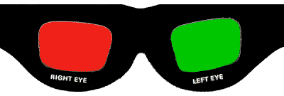 Anaglyphe 3D-Brille Bild: Wilfried Wittkowsky, 2005